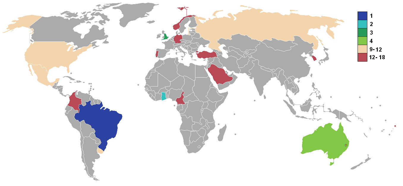 Copa disputada en Portugal